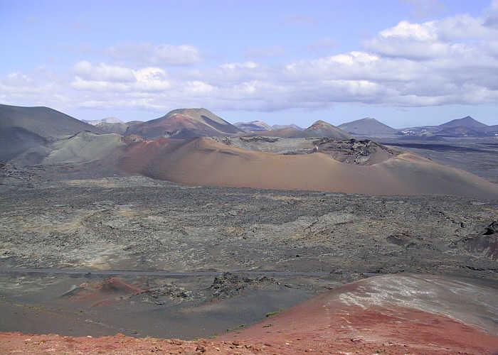 Timanfaya, Lanzarote, 2001